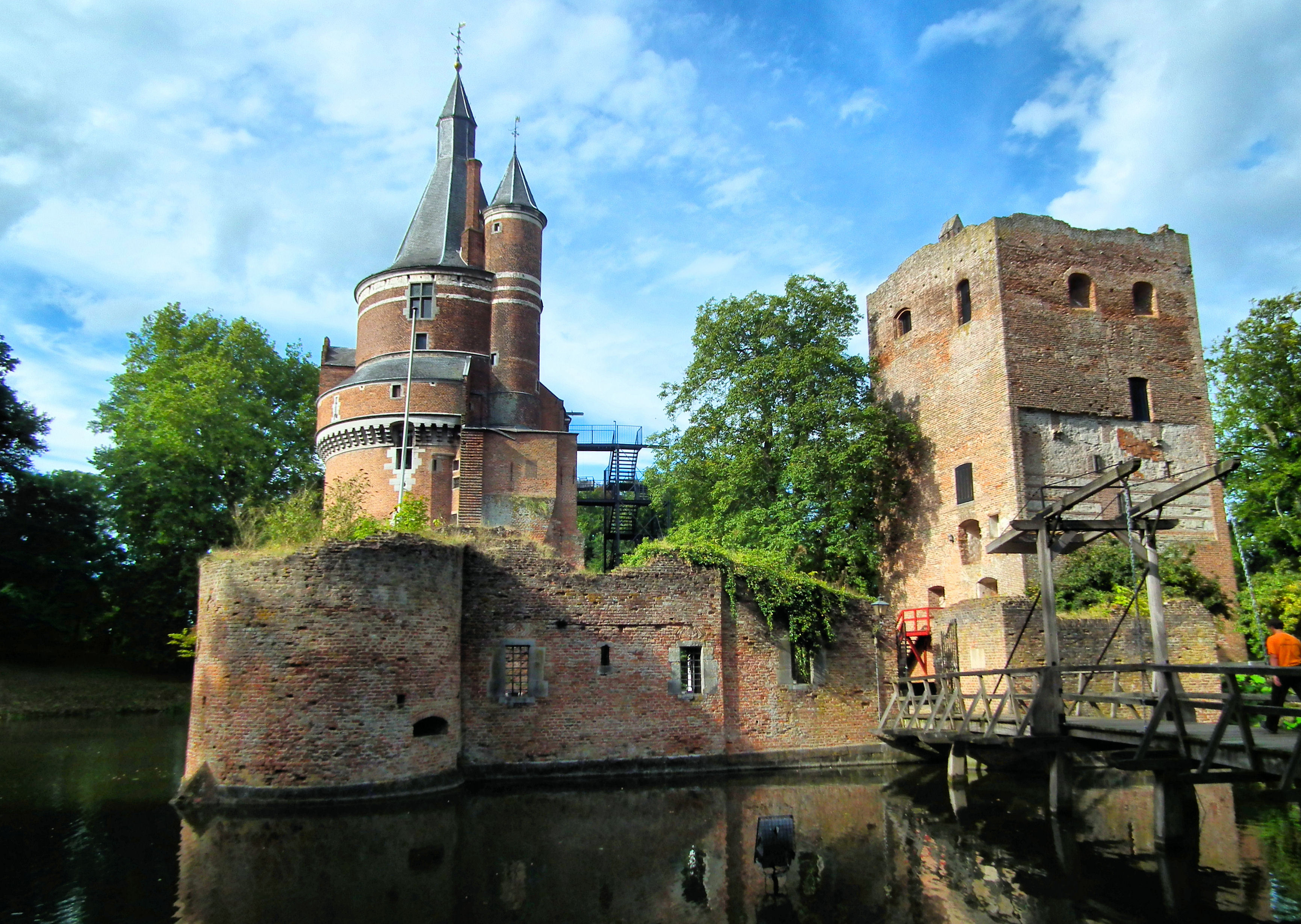 Wijk bij Duurstede - kasteel